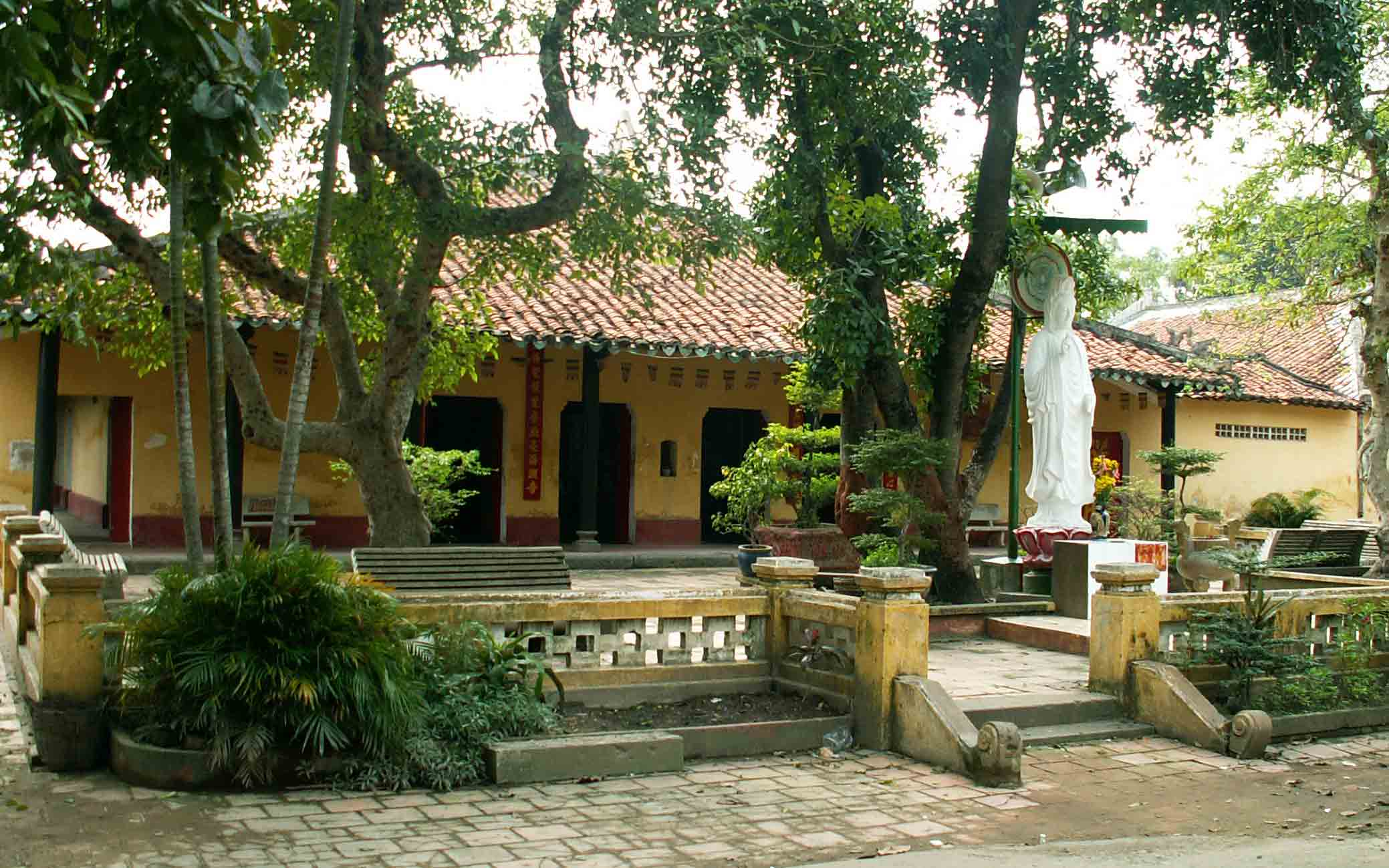 Chùa Giác Viên, thành phố Hồ Chí Minh. Hình này do Lưu Ly tự chụp vào ngày 25 tháng 1 năm 2020 và đưa vào phạm vi công cộng. ==== Heading text ====